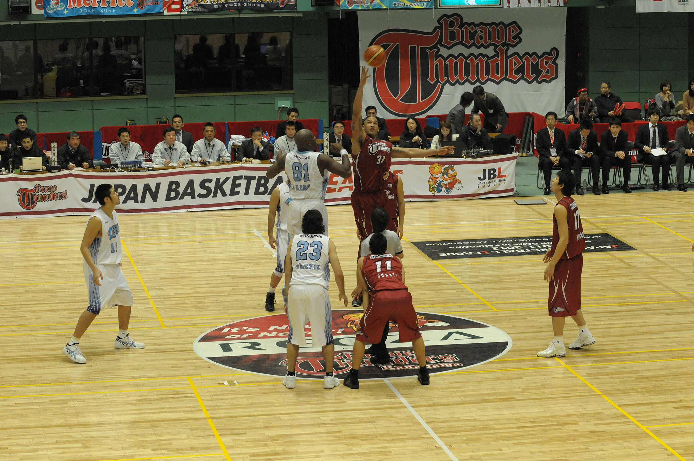 JBL 2011-2012シーズン、東芝ブレイブサンダース対三菱ダイヤモンドドルフィンズ。横須賀アリーナで。